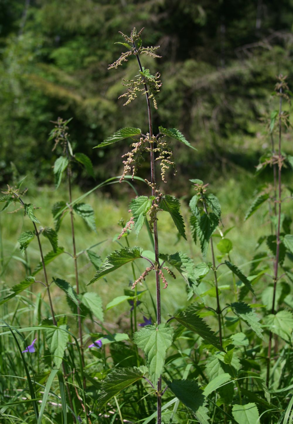 Große Brennnessel (Urtica dioica), Brennnesselgewächse (Urticaceae) - Österreich/Austria/Autriche: Oberösterreich, Hausruckviertel, ca. 2.6 km NE Forsthaus Redltal, ca. 680 m s.m.